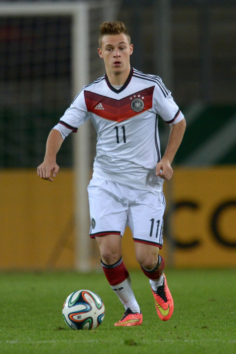 Joshua Kimmich con la selección alemana